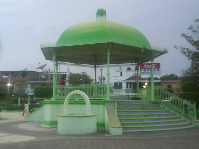 KIOSKO DE SAN MARCOS GRO.